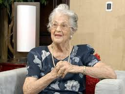 María Ugarte